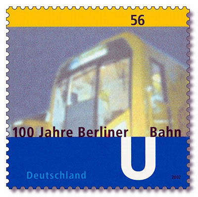 Sondermarke „100 Jahre Berliner U-Bahn“ Beschreibung: Nennwert: 0,56 EUR, Maße: 35 x 35 mm, Hersteller: Wertpapierdruckerei Leipzig, Ausgabe: Zehnerbogen Motiv: Aktueller Triebwagen der U-Bahn Berlin in Fahrt (Langzeitbelichtung)